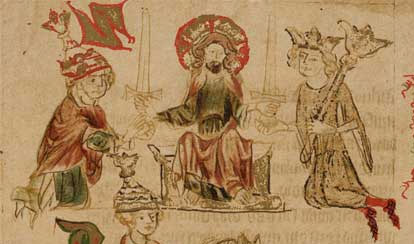 Christus überreicht Papst und Kaiser die Schwerter der geistlichen und weltlichen Macht. Illustration der Zweischwerterlehre aus dem Dresdner Sachsenspiegel (Faksimile Karl von Amiras, 1902)[1]